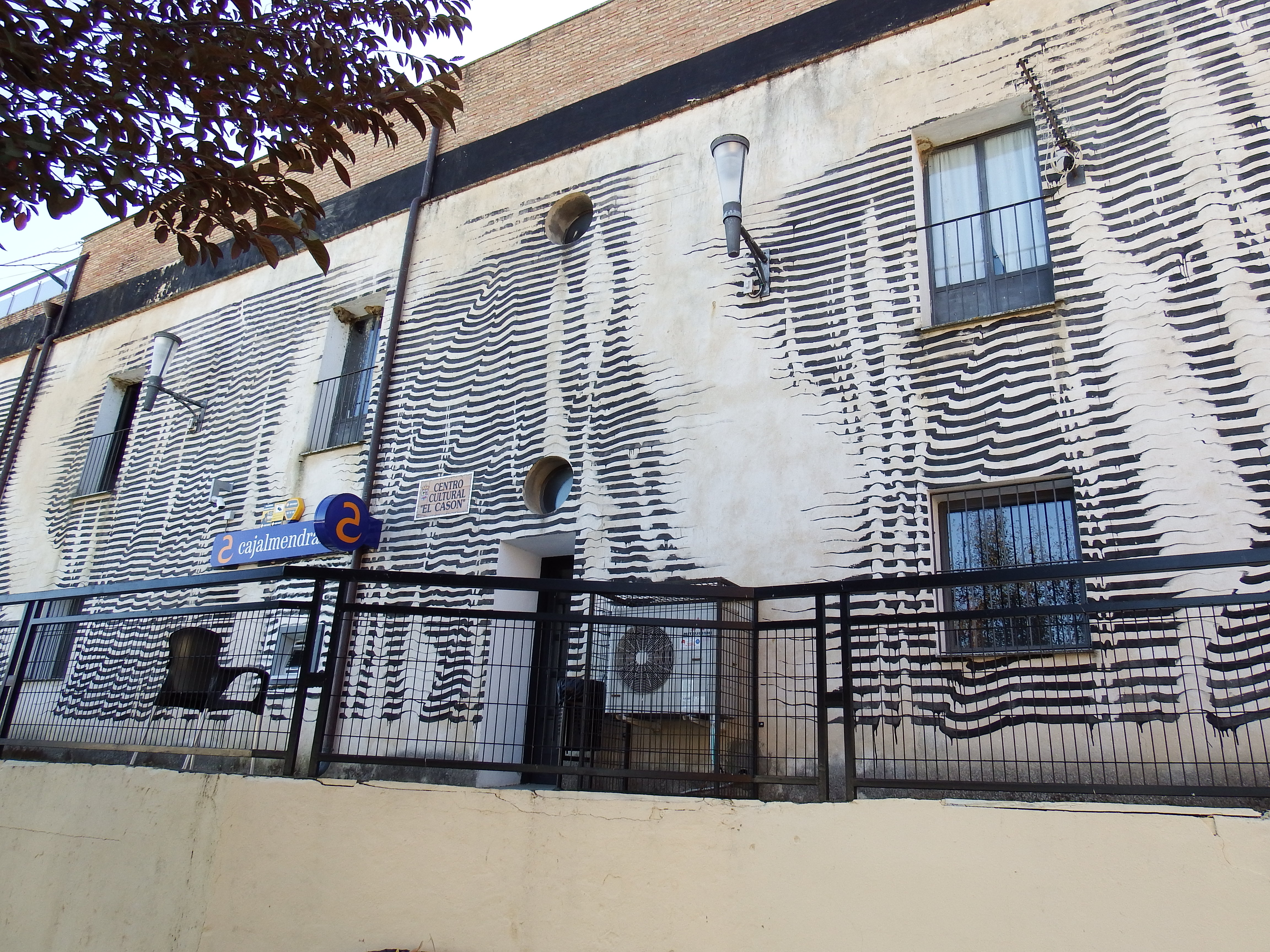 Cedillo